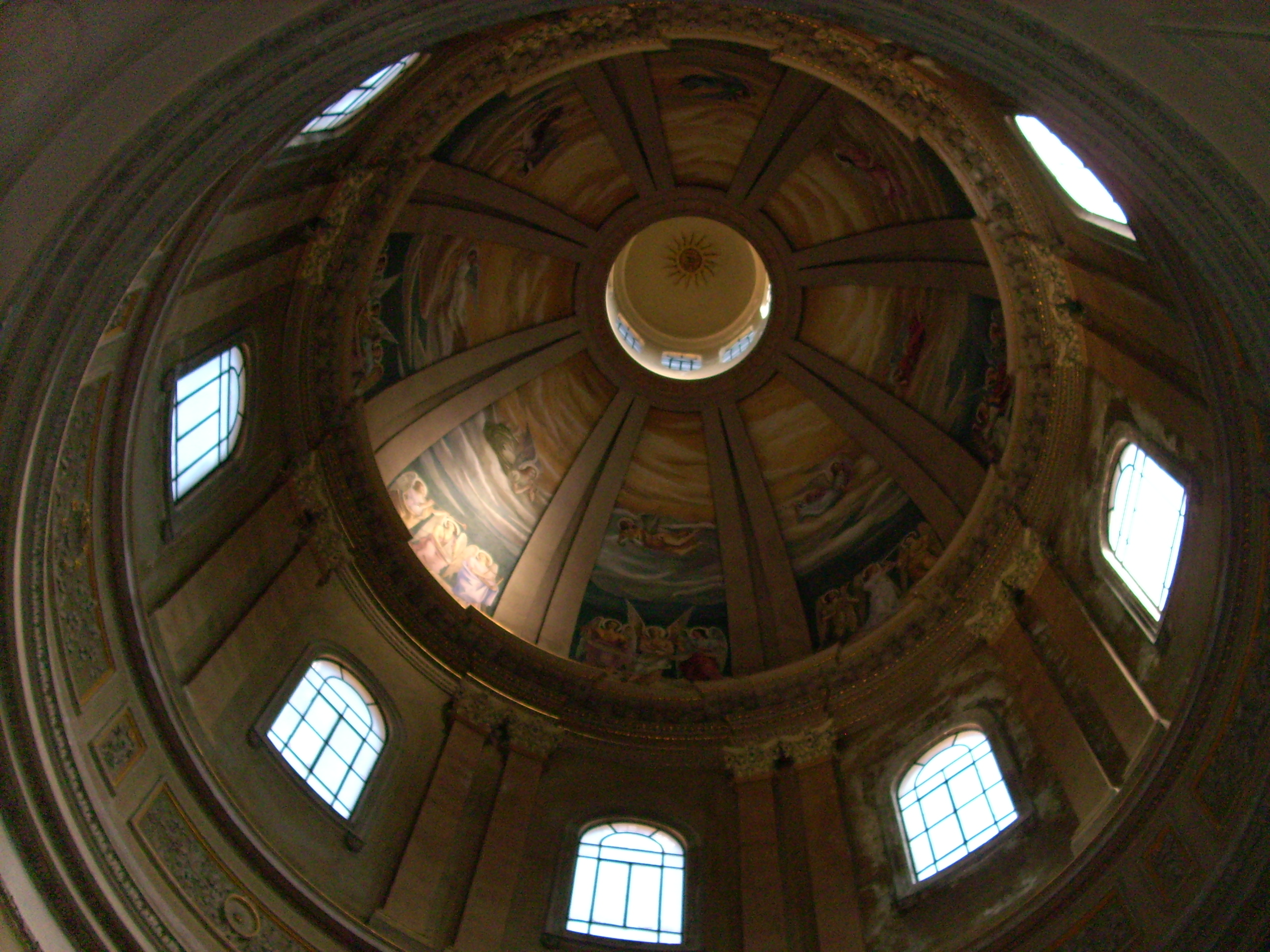 Santuario di Nostra Signora del Deserto di Millesimo, Liguria, Italia